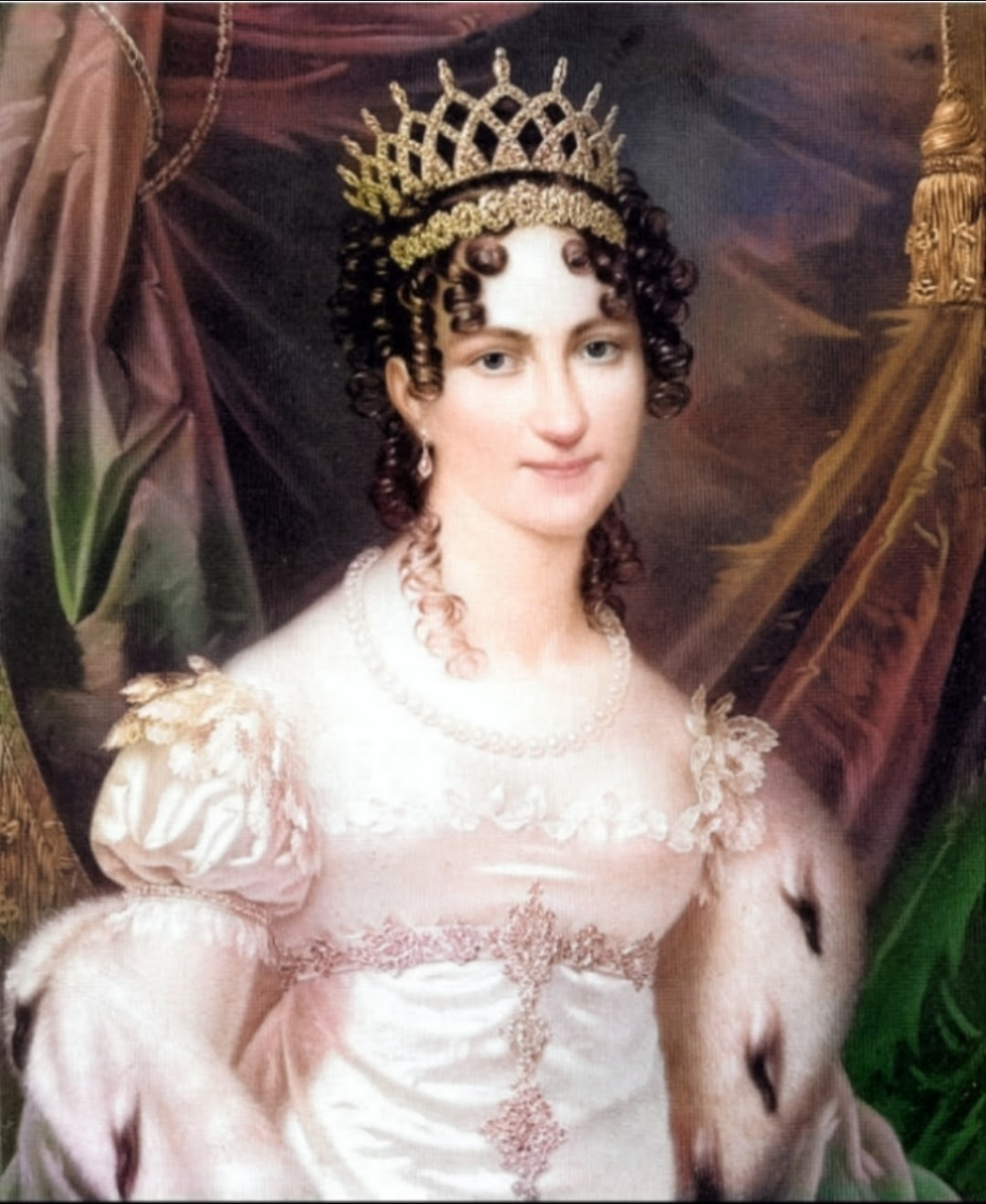 Karoline Auguste von Bayern (1792-1873), vierte Ehefrau von Kaiser Franz I. (II.) von Österreich